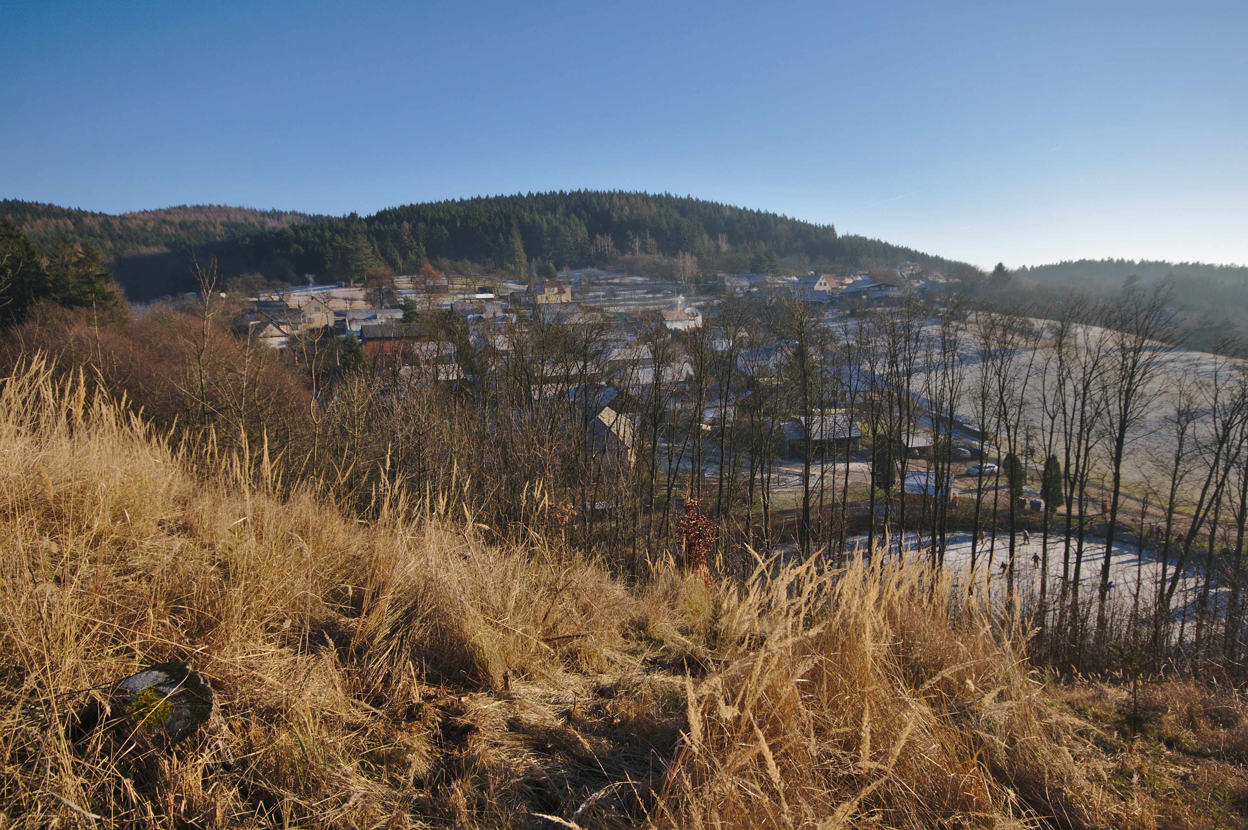 Pohled na vesnici od západu, Zálesí, Biskupice, okres Svitavy